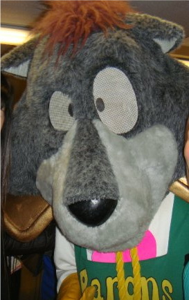 LSL's Mascot